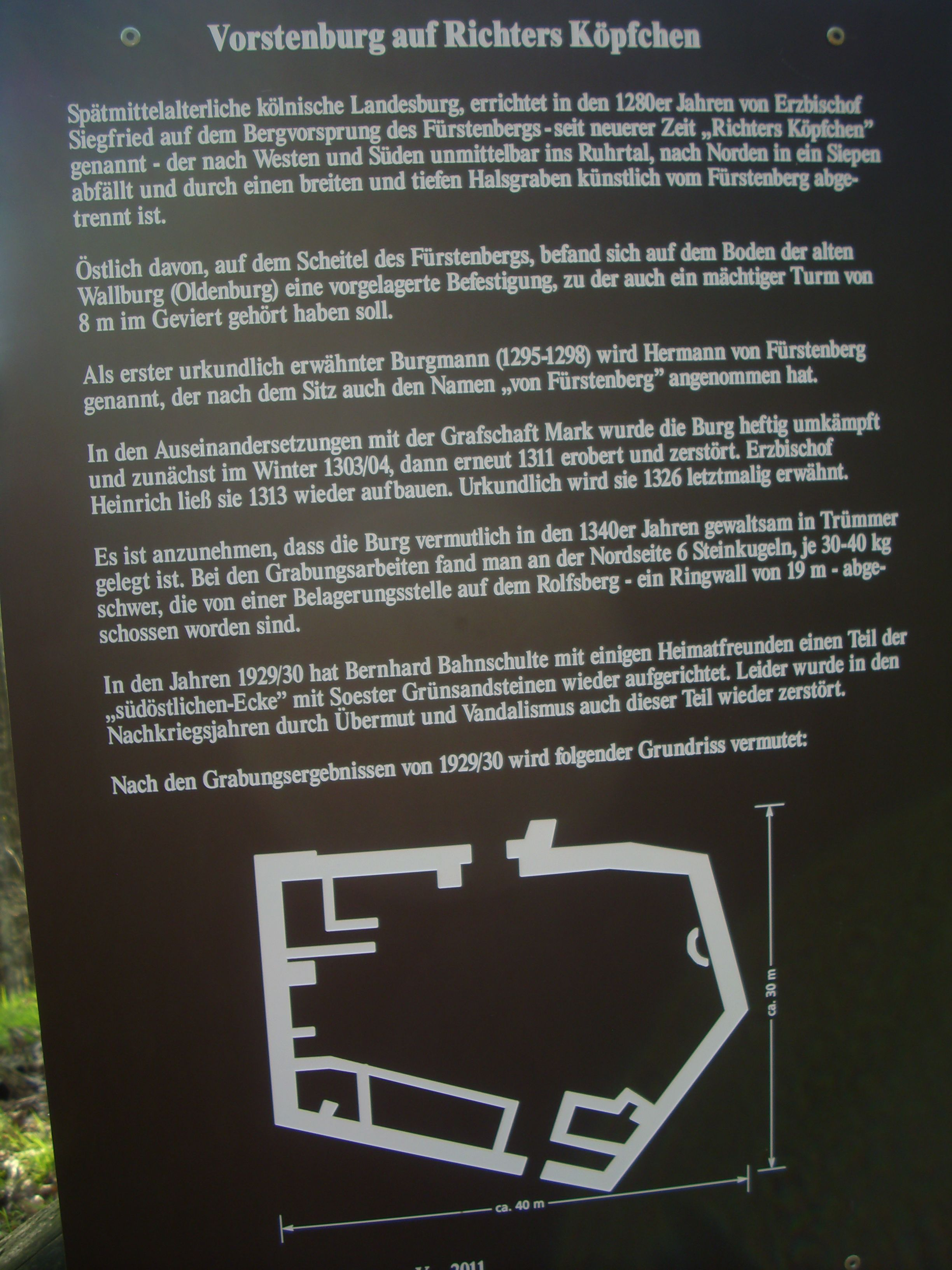 Hinweistafel Burg Fürstenberg (Höingen) am "Richters Köpfchen", aufgestellt durch den Heimatbund Neheim-Hüsten